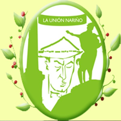 escudo de la union nariño